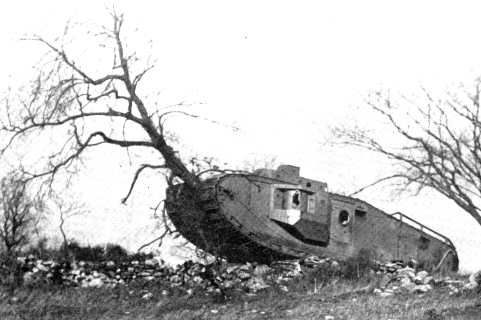 Digitale reproductie afbeelding van de officiële press release uit 1918 van het Libertytank-prototype